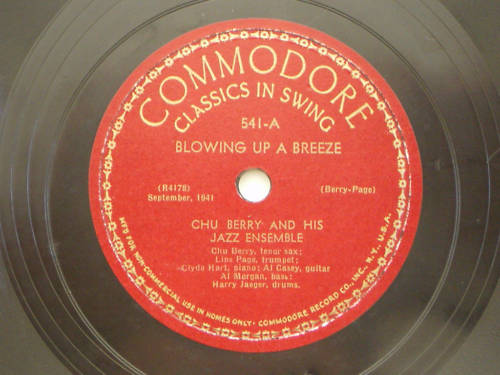 Chu Berry: Blowing Up a Breeze - Monday at Mnton's (Commodore Records, September 1941)